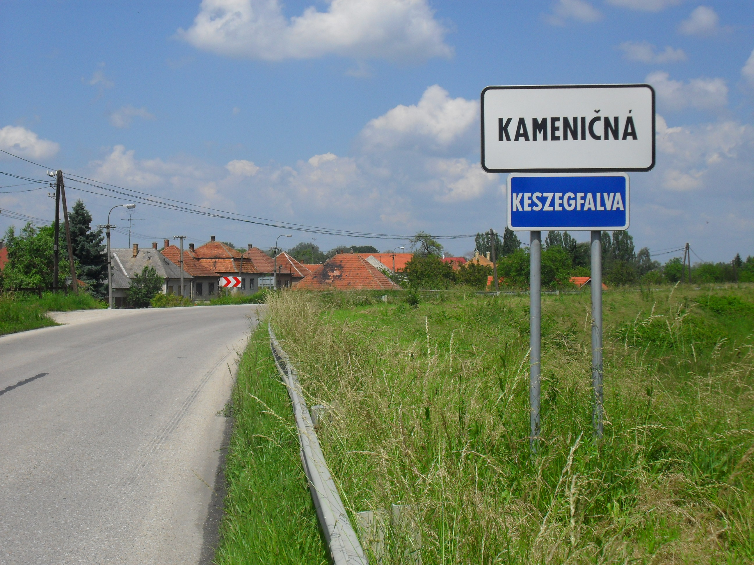 Keszegfalva - helységnévtábla az 573-as úton